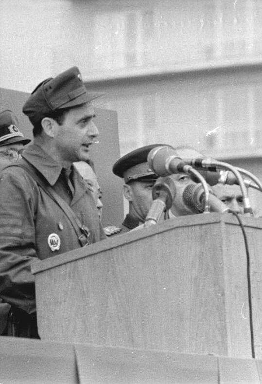 ADN-ZB 23.8.1961 Berlin: Sicherung der Staatsgrenze am 13.8.1961. Appell der Berliner Kampfgruppen am 23.8.1961 in der Karl-Marx-Allee. Kommandeur Lobenstein verliest den Tagesbefehl.